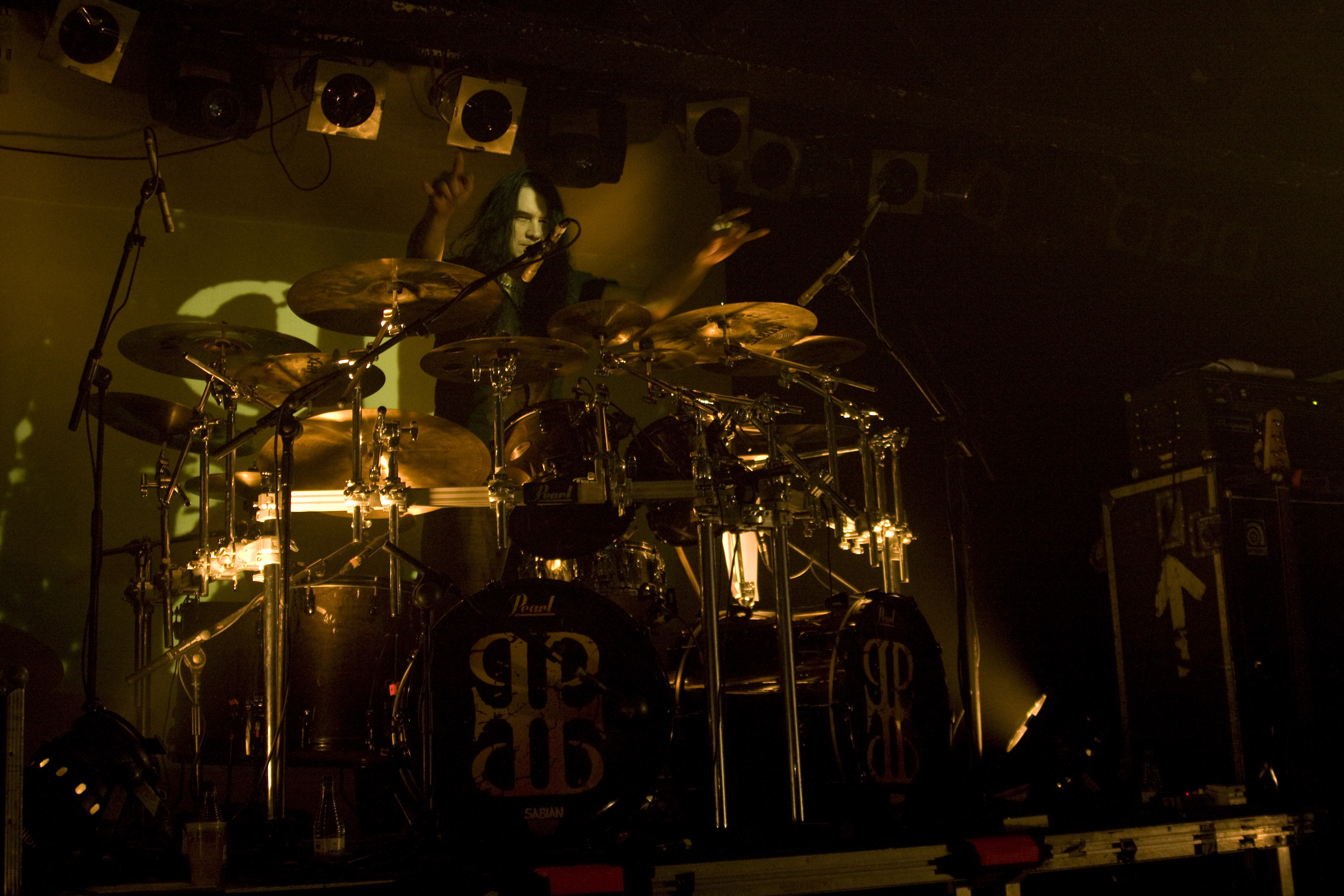 Adrian Erlandsson, batería sueco de la banda Paradise Lost, actuando en la sala Razzmatazz de Barcelona.